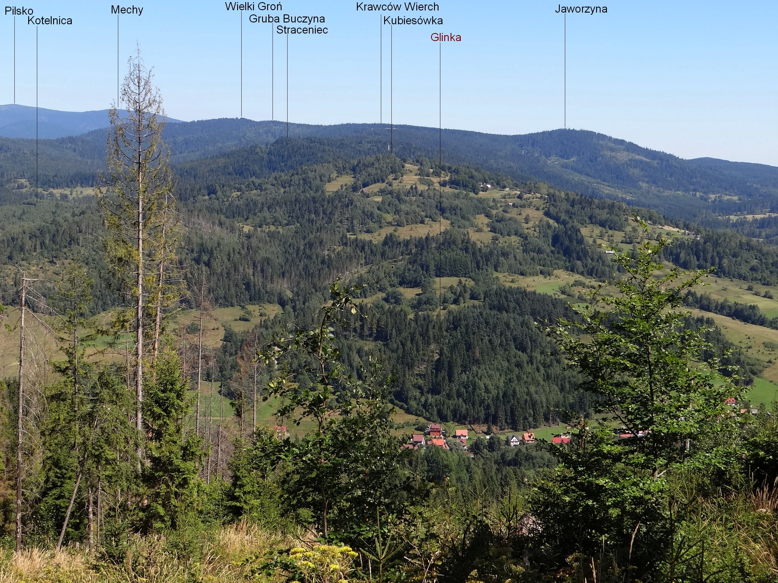 Widok z Muńcuła